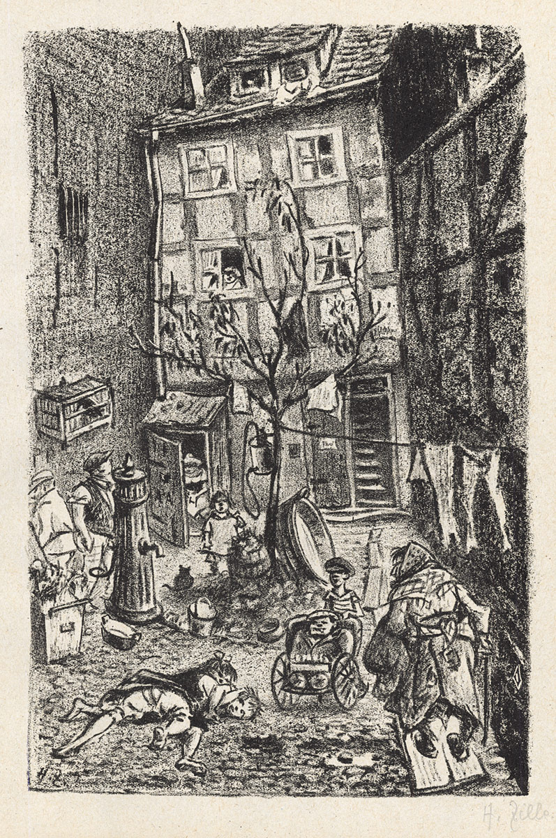 Hof im Scheunenviertel. Lithographie 28,2 x 18,3 cm (Darstellung); 1919 28. Blatt des Zyklus "Zwanglose Geschichten und Bilder".